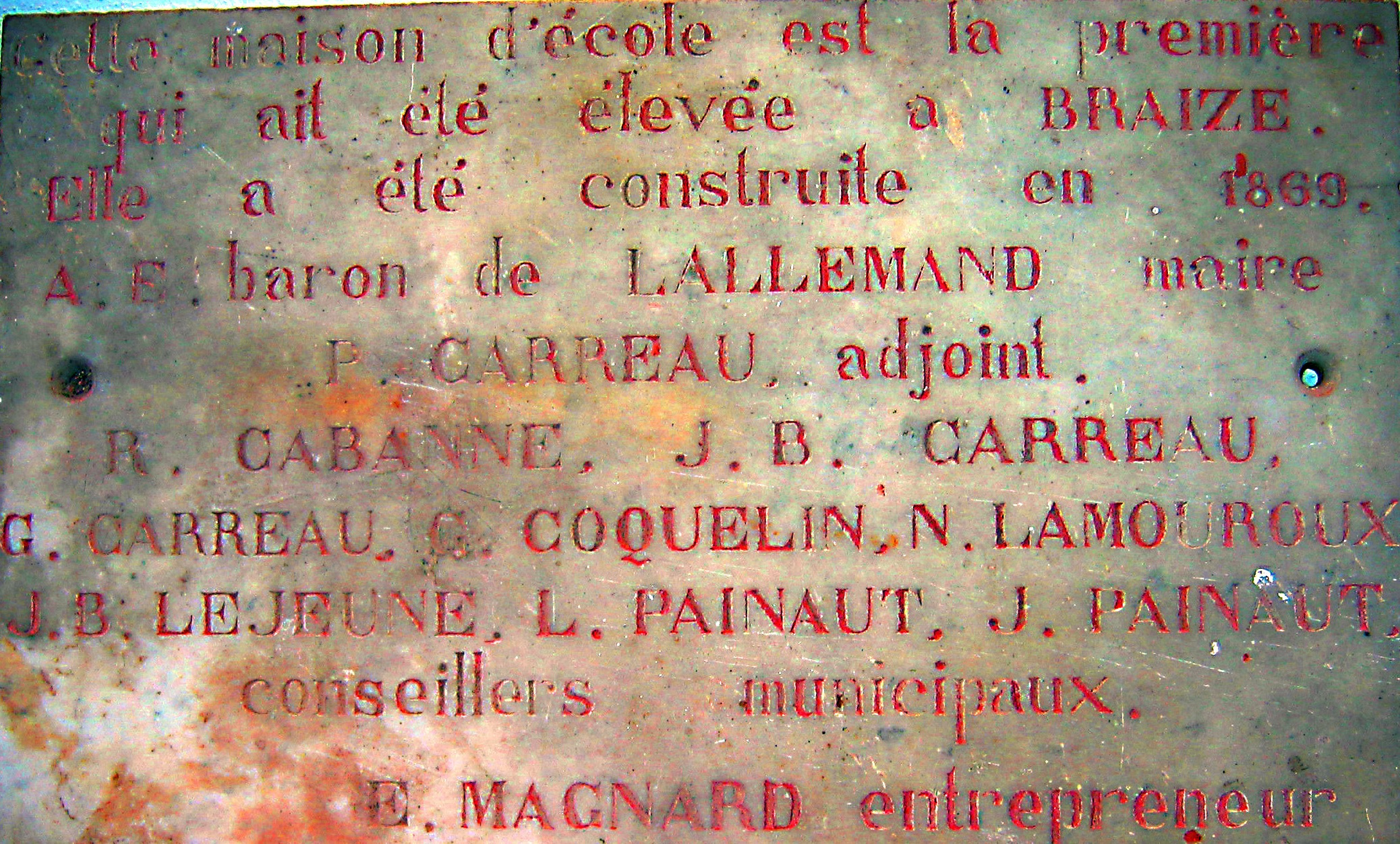 Cette plaque, apposée lors de la construction de la première école à Braize, en 1869, a retrouvé sa place à la rentrée 2006, à l'initiative du maire, M.Guy Lalevée.